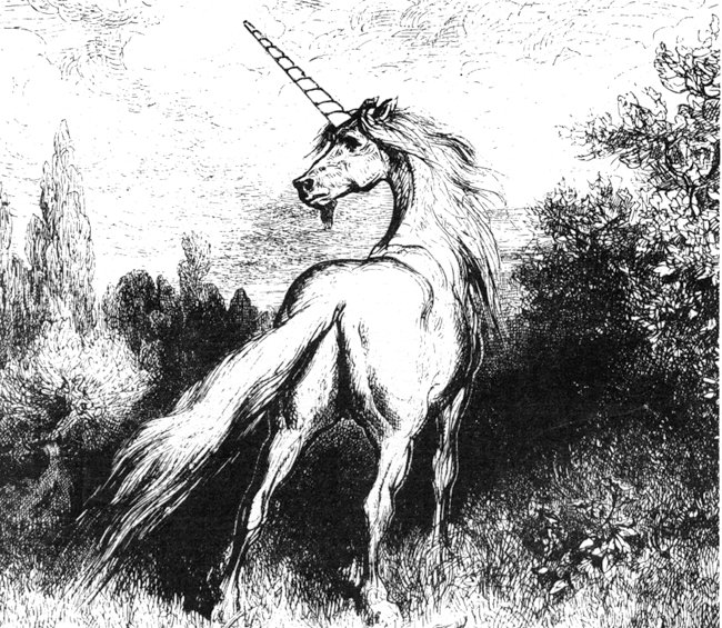 Gravure romantique du XIXème siècle dont l'auteur original reste inconnu